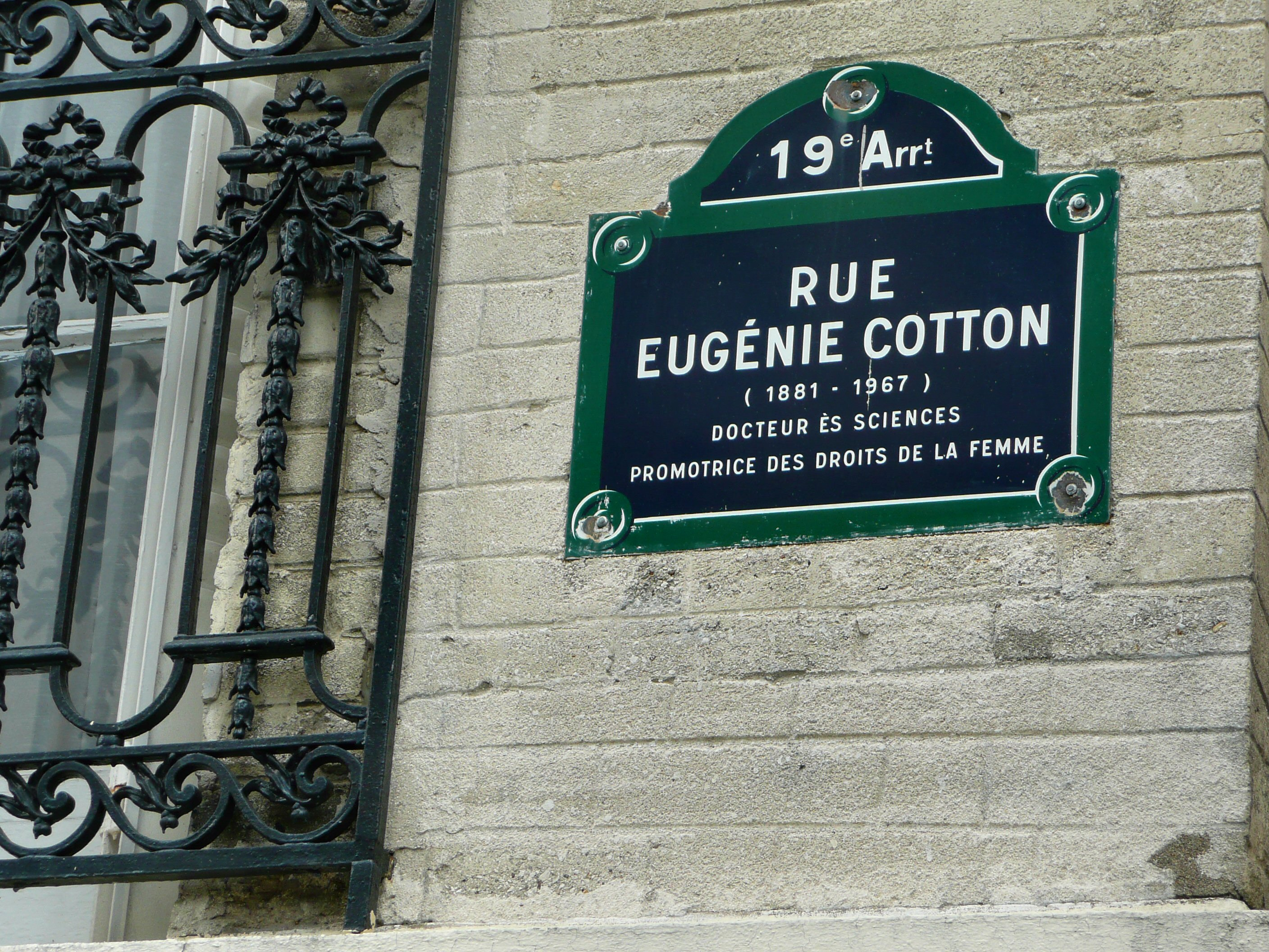 Plaque de la rue Eugénie-Cotton, dans le 19e arrondissement de Paris, en mémoire de la scientifique française éponyme (1881-1967)